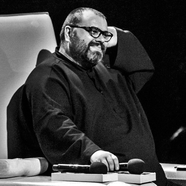 Проект "Главная сцена".